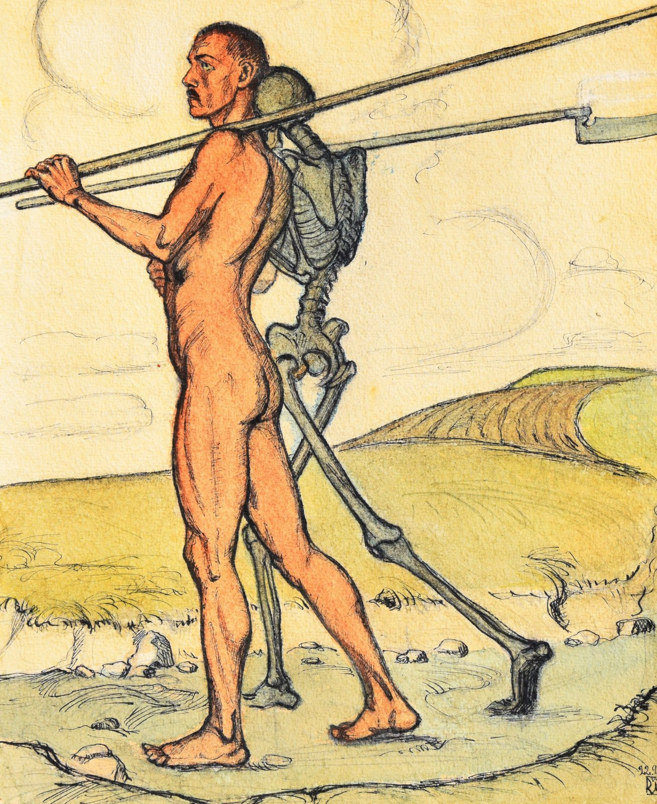 "Krieger und Tod“, Aquarell und Tuschfeder, datiert "22.9.1918". 24×29,1cm. Verso (wohl) vom Künstler in Blei bez. „Vfw [Vizefeldwebel] Wolf Willrich / PG 391 / Dépot Chateau d`Oleron / Charente inférieure